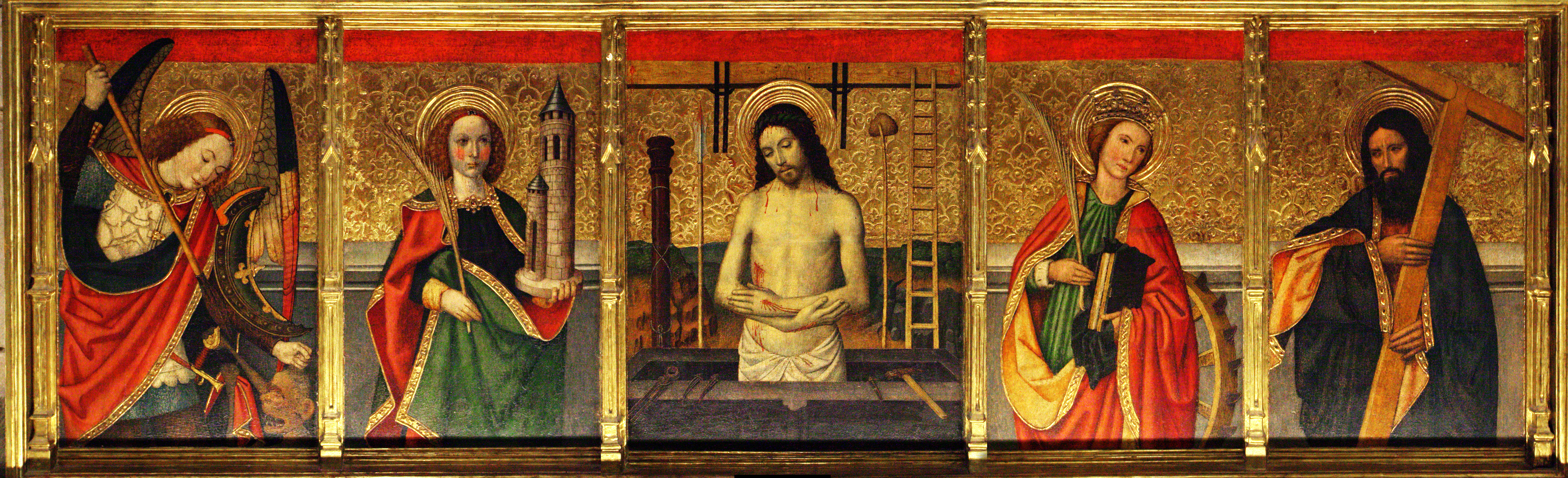 Predel·la del “Retaule de la transfiguració” de Jaume Huguet a la sala de l´antic refectori dels canonges, de la catedral de Tortosa. La seva ubicació original era a la capella central de la girola, darrera l'altar major. D'esquerra a dreta: Sant Miquel, santa Bàrbara, Ecce Homo, santa Caterina i sant Andreu.